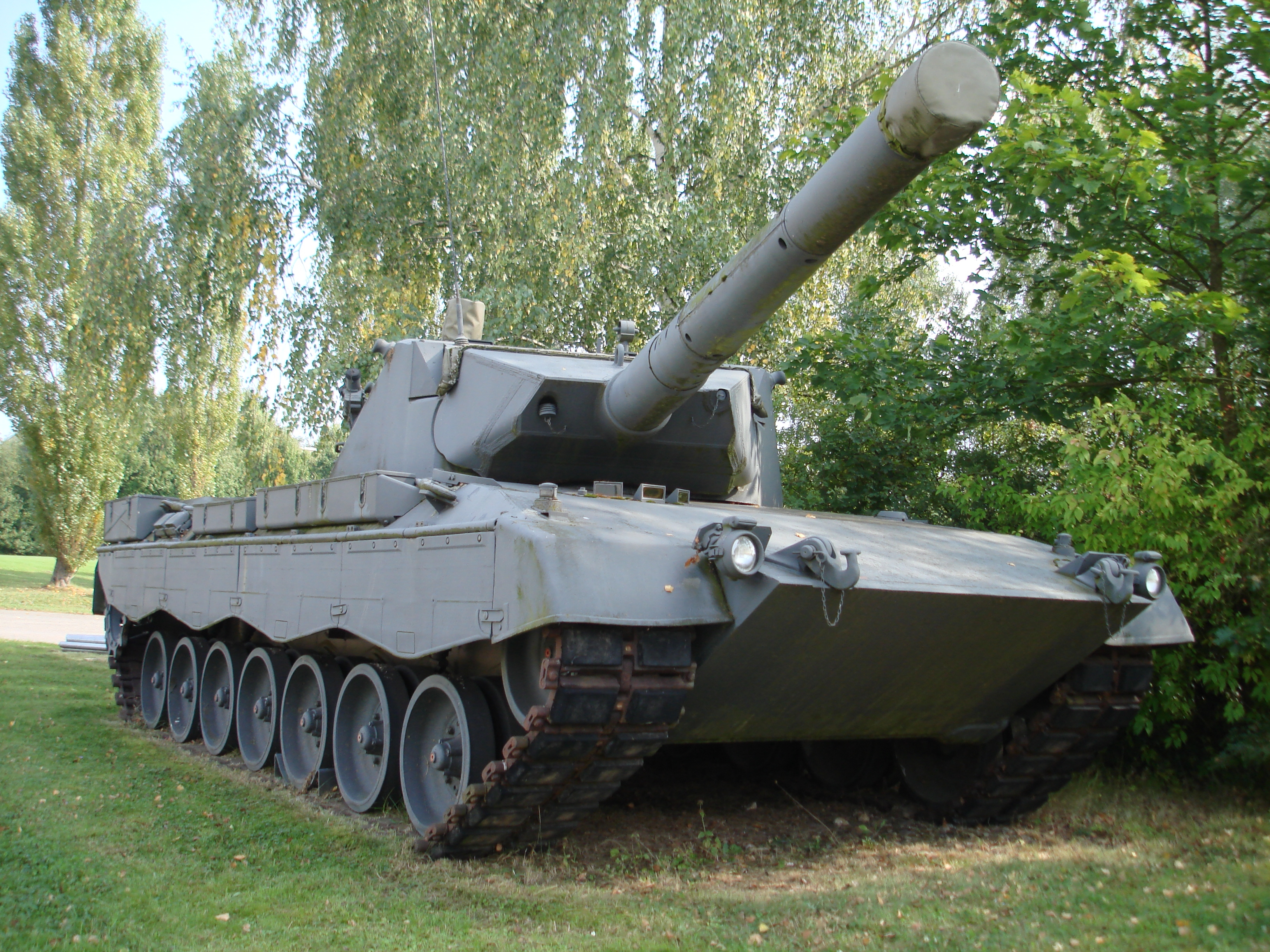 Leopard 2 Prototyp. Fahrgestell PT15 mit Turm T02 und 105-mm-Bordkanone auf dem Gelände der Wehrtechnischen Dienststelle 41, Trier. Die Ähnlichkeit mit dem Leopard 1A4, vor allem des Turms, war beabsichtigt.